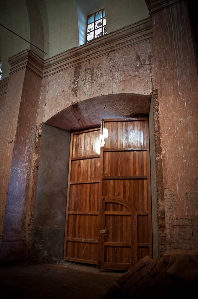 Iglesia de Pocoata. Esta foto se tomó el 27 de septiembre, 2011 en Catavi, Potosí, Bolivia, con una Nikon D90.